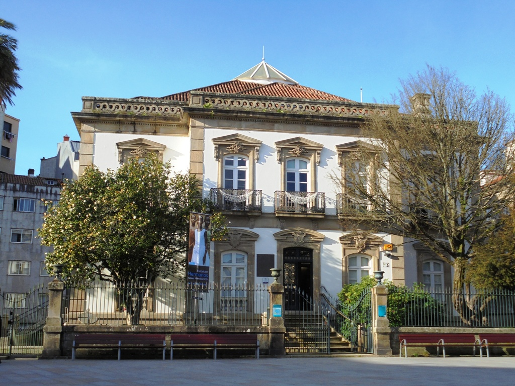 Palacete de las Mendoza en Pontevedra Capital